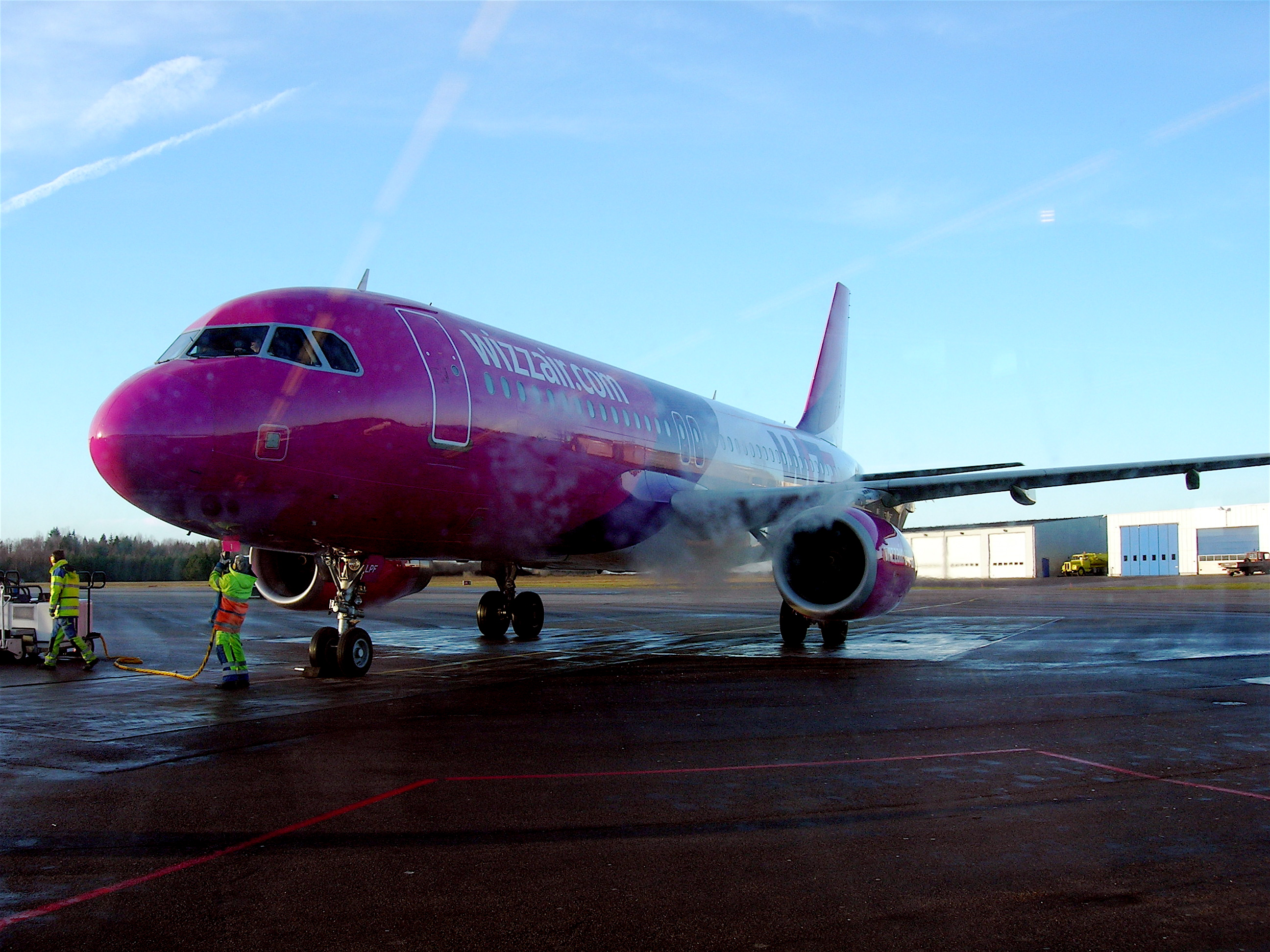 Wizz Air